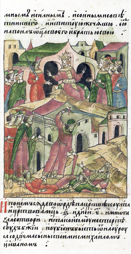 ЛИЦЕВОЙ ЛЕТОПИСНЫЙ СВОД После него сел в Орде на царство Кулпа, царствовал 6 месяцев и 5 дней и много зла сотворил. И не потерпел этого суд божий, и его убил Наурус с двумя своими сыновьями, с Михаилом и Иваном.